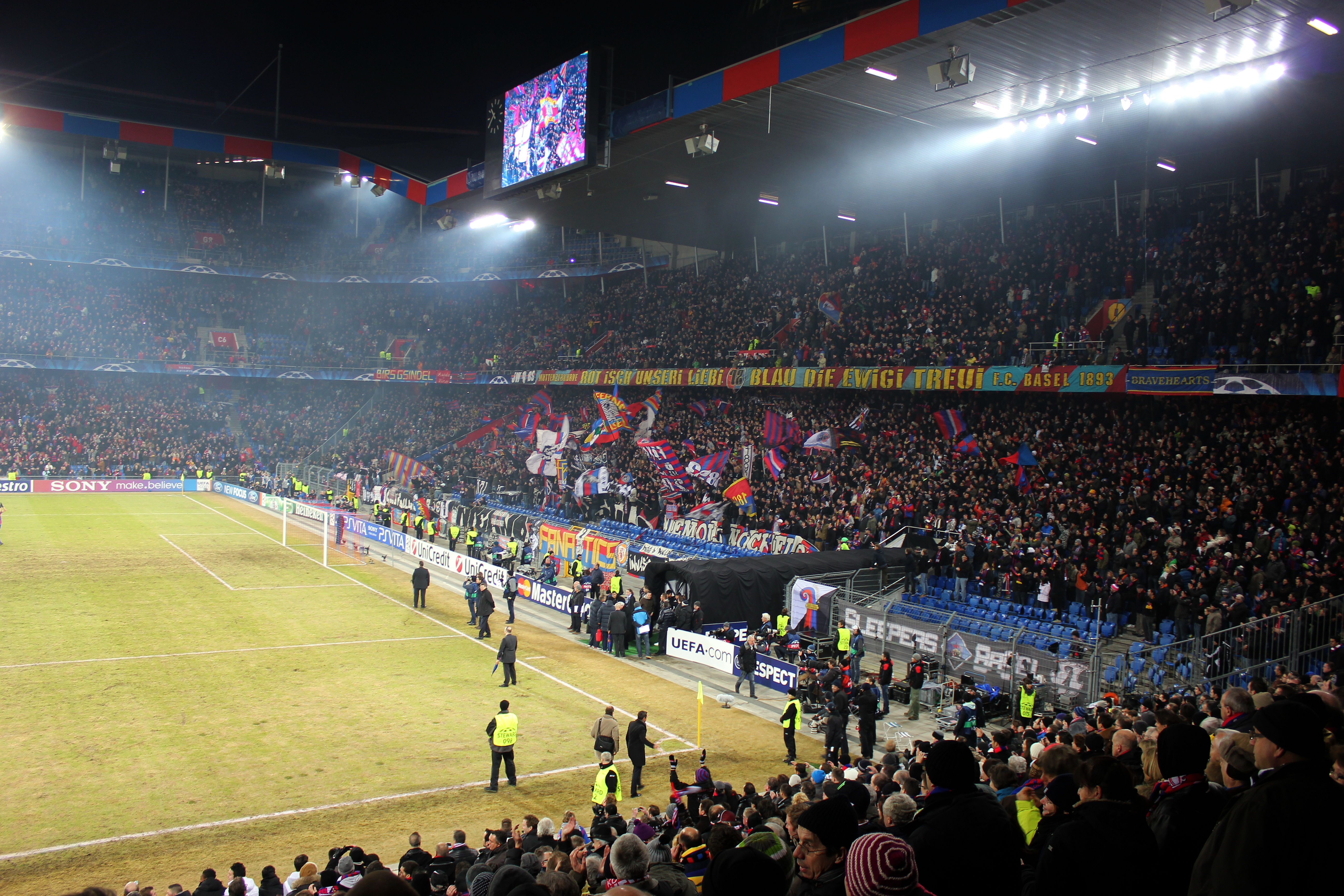 Basel, St.-Jakob-Park - Muttenzer Kurve. UEFA Champions League 2011-2012, Achtelfinale Hinspiel (round of 16, first leg), FC Basel - FC Bayern München 1:0.